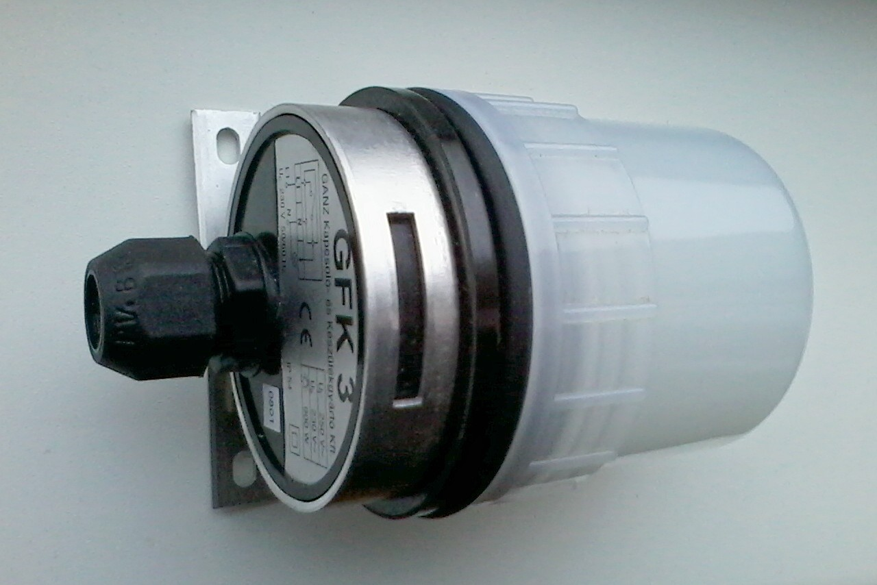 Знято мобілкою Самсунг